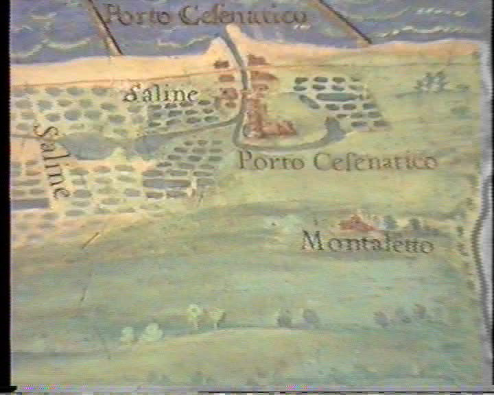 Porto Cesenatico extrait de la carte "Flaminia" du XVIII siècle, filmée (personnellement)au musée du Vatican.